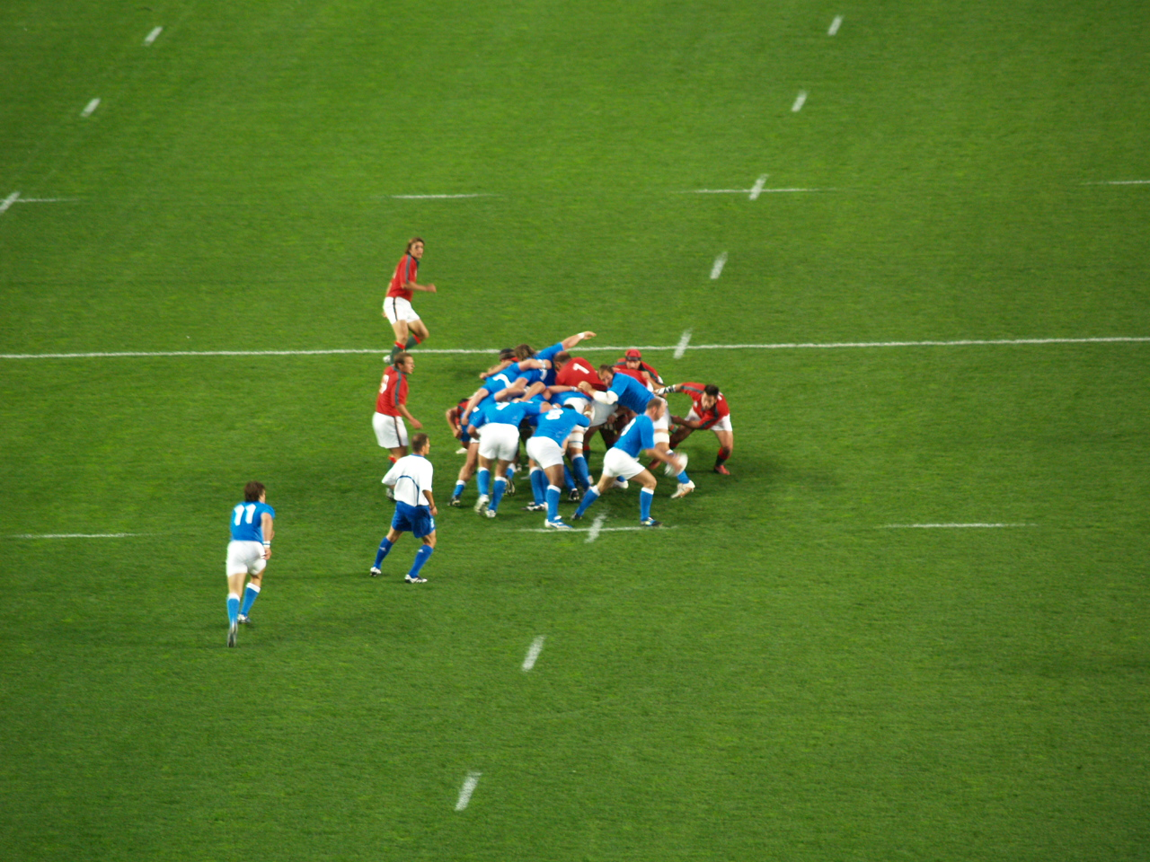 Match Italie contre le Portugal - Coupe du Monde de Rugby 2007